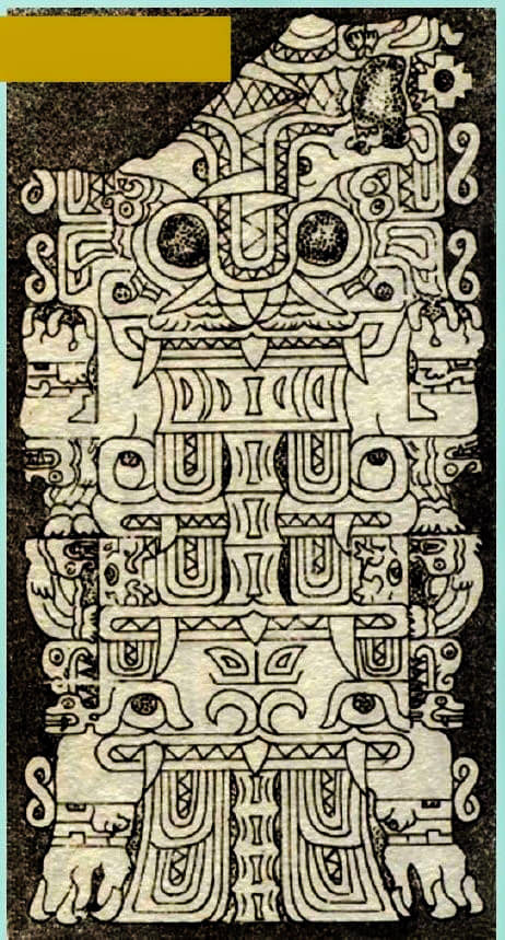 Estela de Yauya, huanca chavín